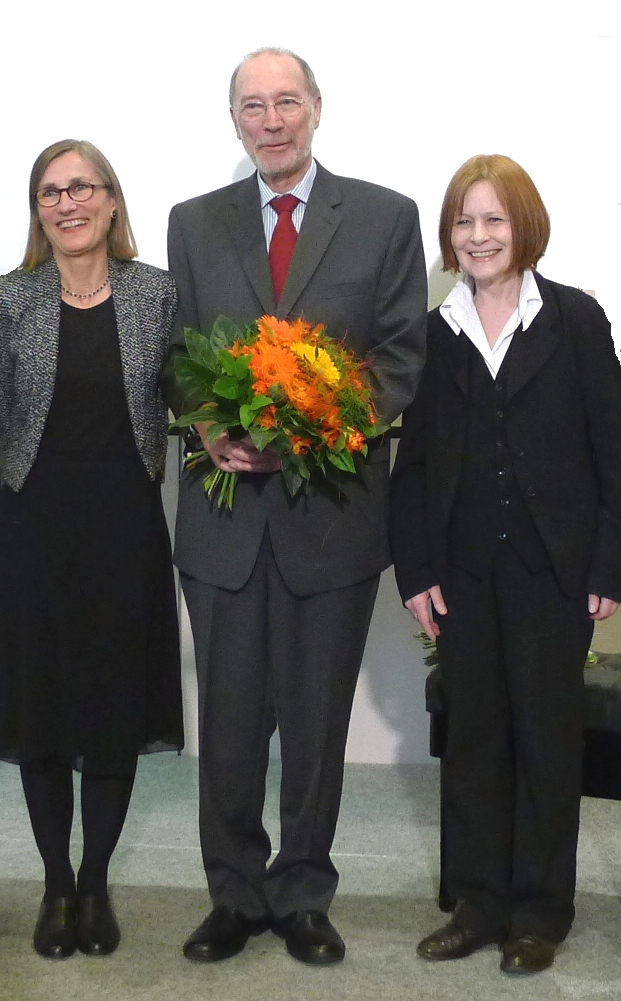 Burkhart Kroeber nach der Preisverleihung mit der Präsidentin des "Freundeskreises für die Förderung literarischer und wissenschaftlicher Übersetzungen e.V"., Susanne Höbel (links) und der Laudatorin, der Literaturkritikerin Sibylle Cramer.